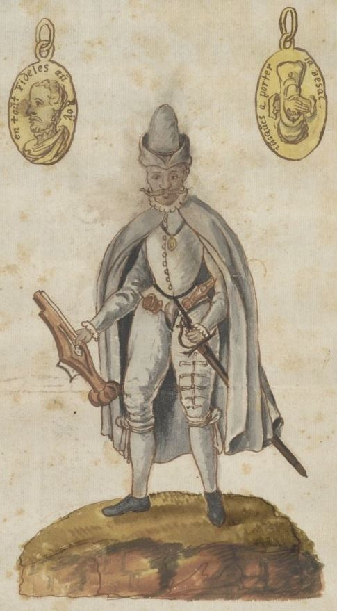 Anonieme gekleurde pentekening: Lid van het eedverbond der edelen in grijs livrei met geuzenpenning, bedelnap, zwaard, pistool en Turkse snor (Nationaal Archief, Den Haag, Handschriftenverzameling Rijksarchief in Zuid-Holland: Tweede Serie, nummer toegang 3.22.01.02, inventarisnummer 1462)